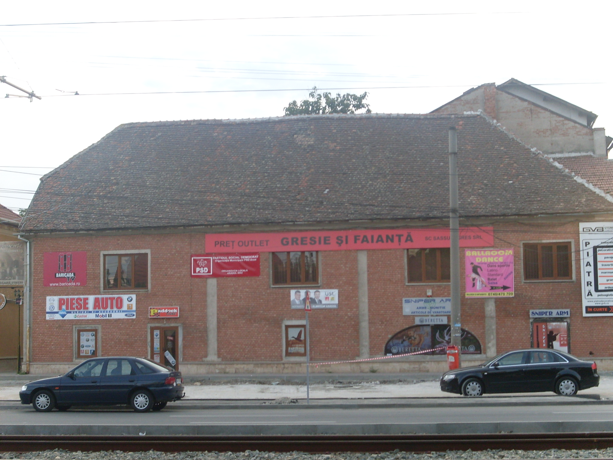 Fosta fabrică de bere, azi spații comerciale și birouri